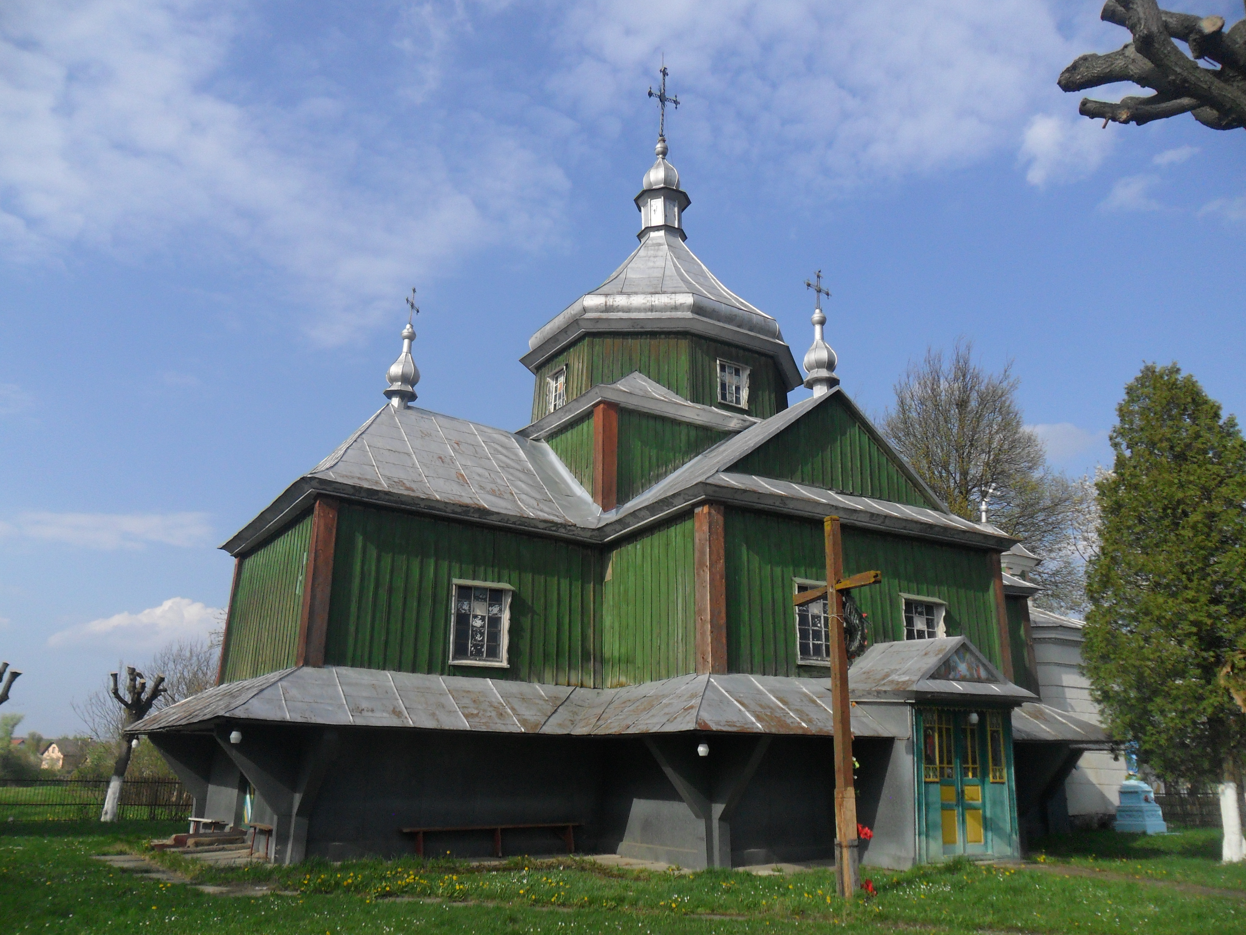 Церква Вознесіння Господнього (1867), село Підлісся (Тисменицький район).